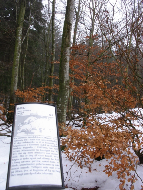 Den jyske skovhave, Skørping